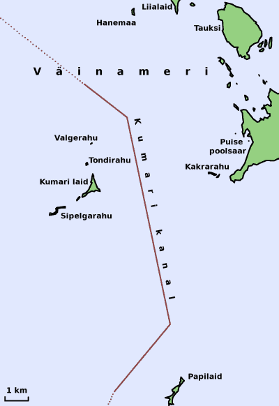 Kumari kanal Väinameres. Kaart joonistatud Maa-ameti ajalooliste kaartide (vene 1945–1952) andmete järgi.